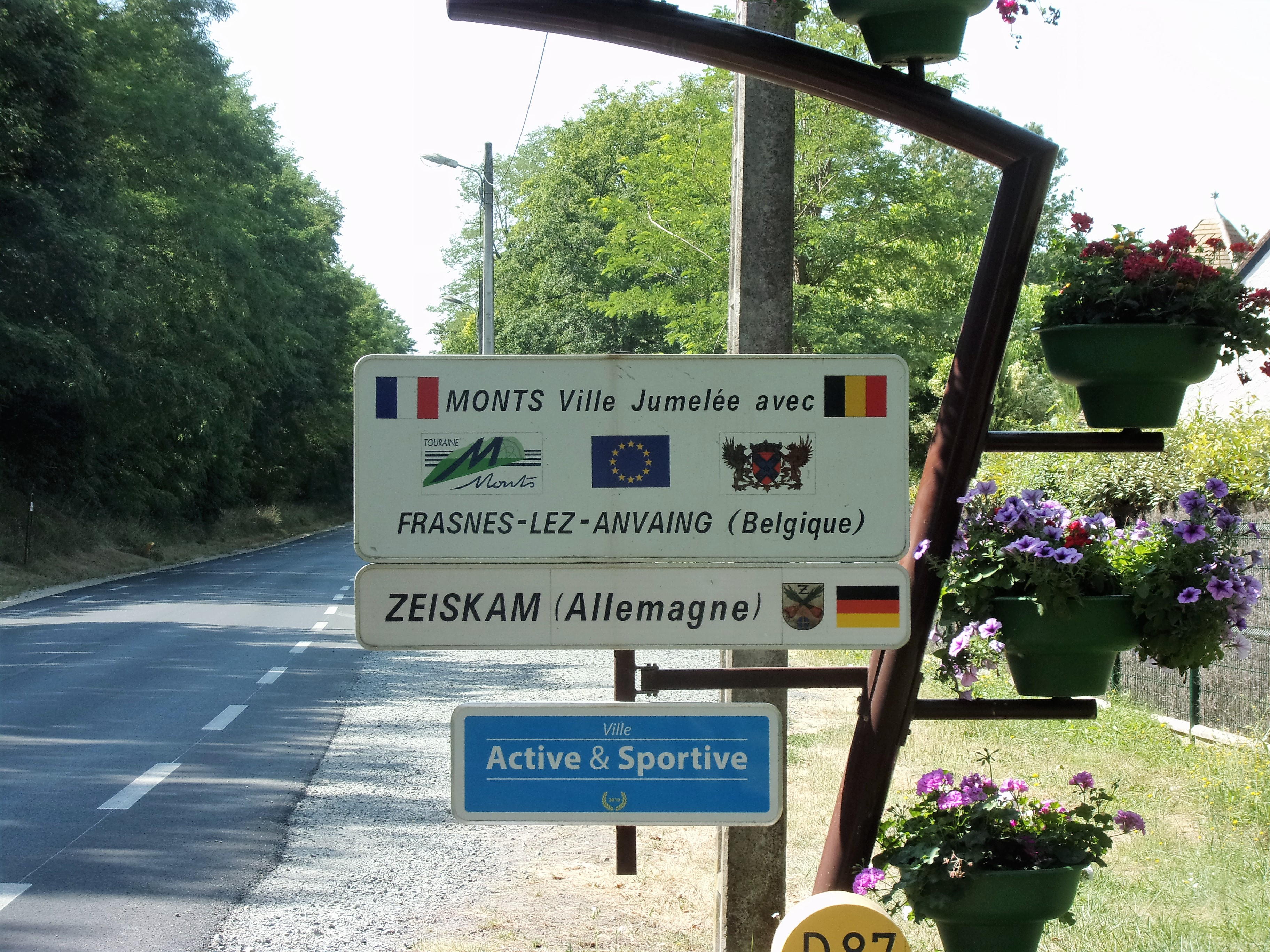 Monts (37) : panneau des jumelage de la commune à l'entée de l'agglomération.